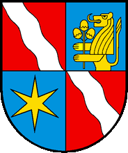 Wappen Haslen Kanton Glarus Schweiz